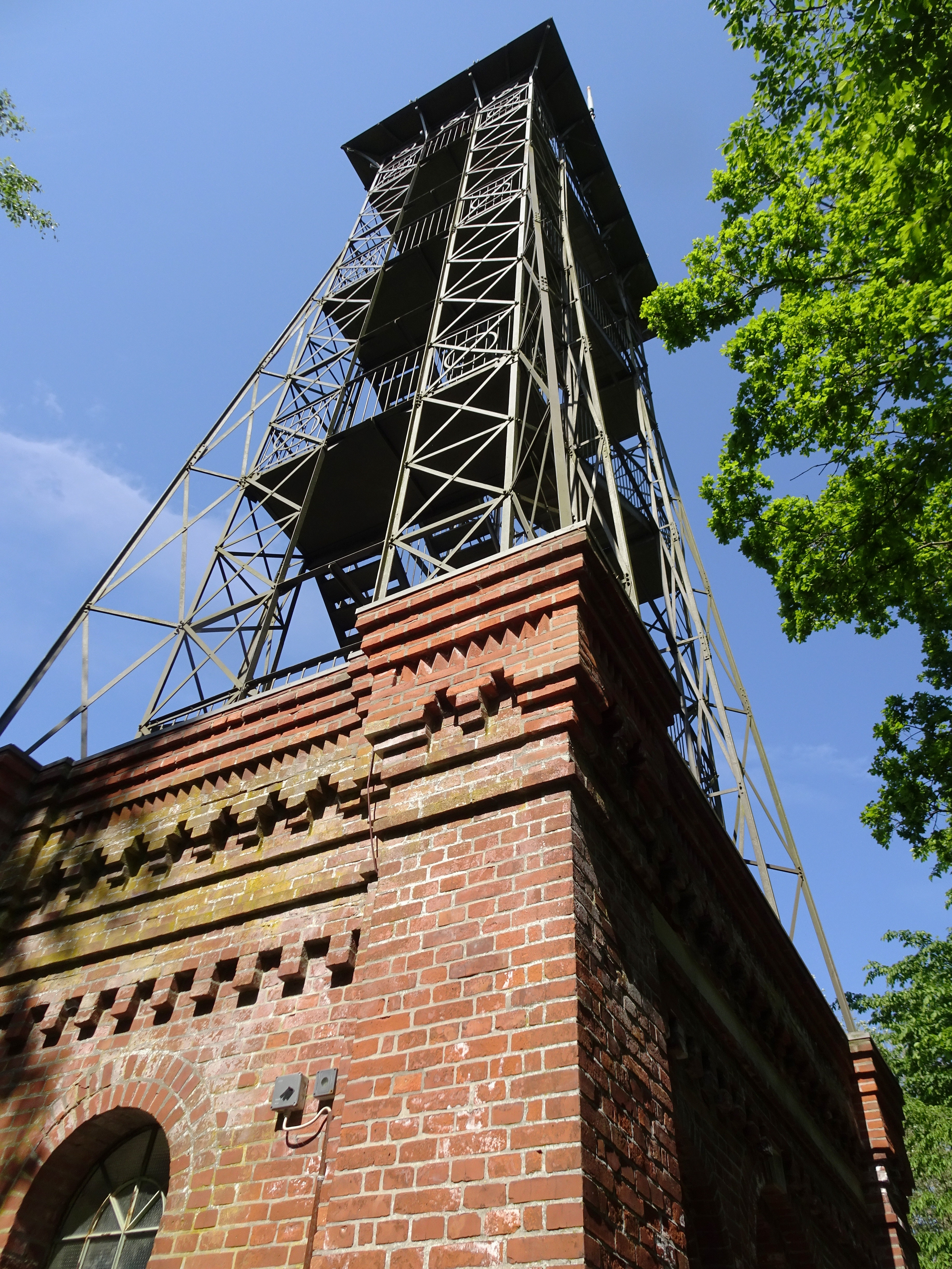 Der Parnass-Turm in Plön